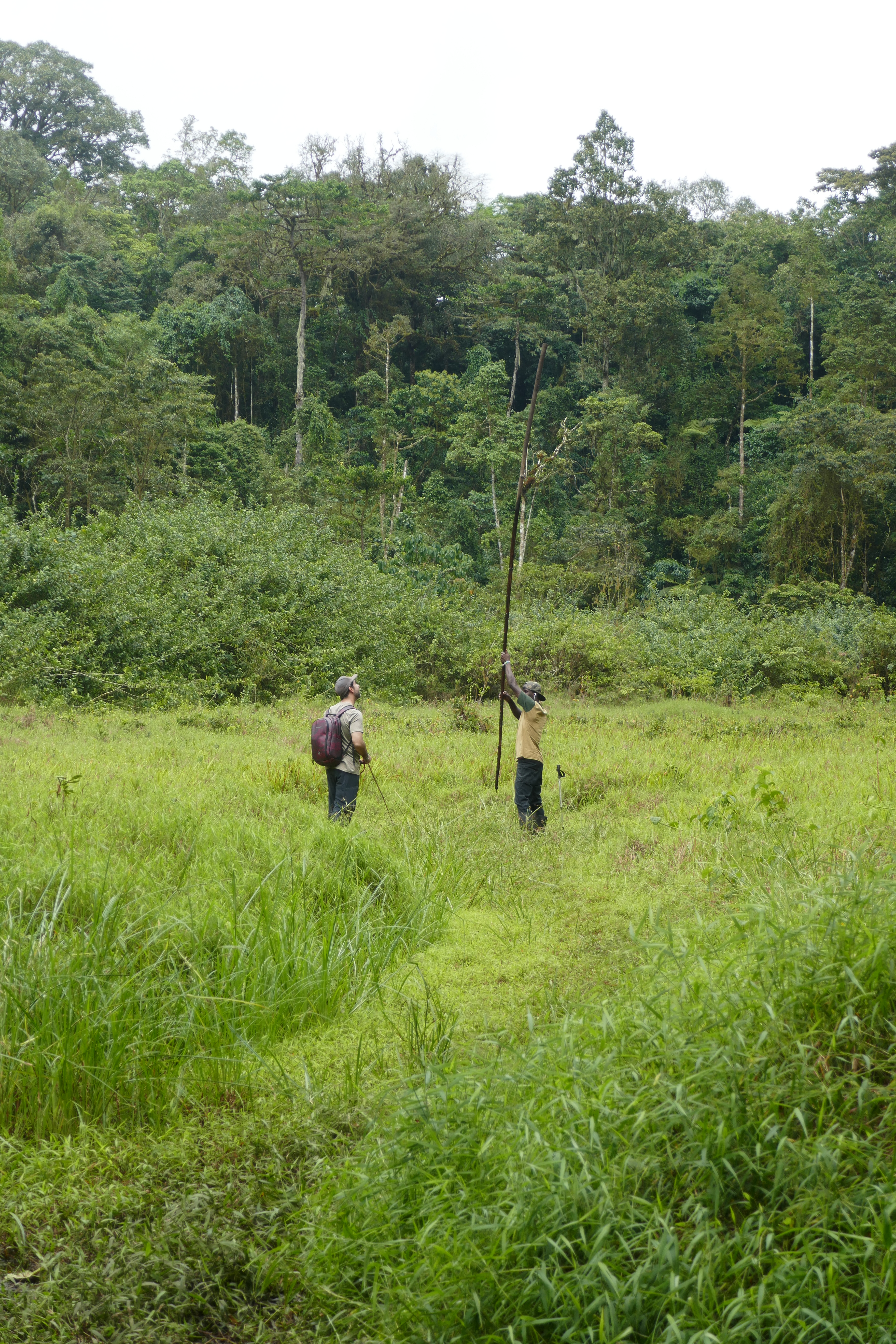 Tapis végétal recouvrant l'ancien lac de cratère Amélia, sur l'île de São Tomé, dans le district de Mé-Zóchi (São Tomé-et-Principe). On peut y marcher en toute sécurité et en évaluer la profondeur avec une perche de plusieurs mètres.